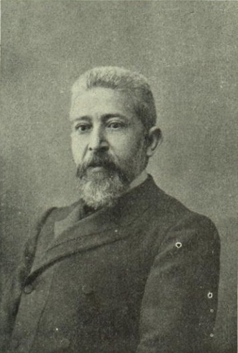 Eleuterio Delgado.